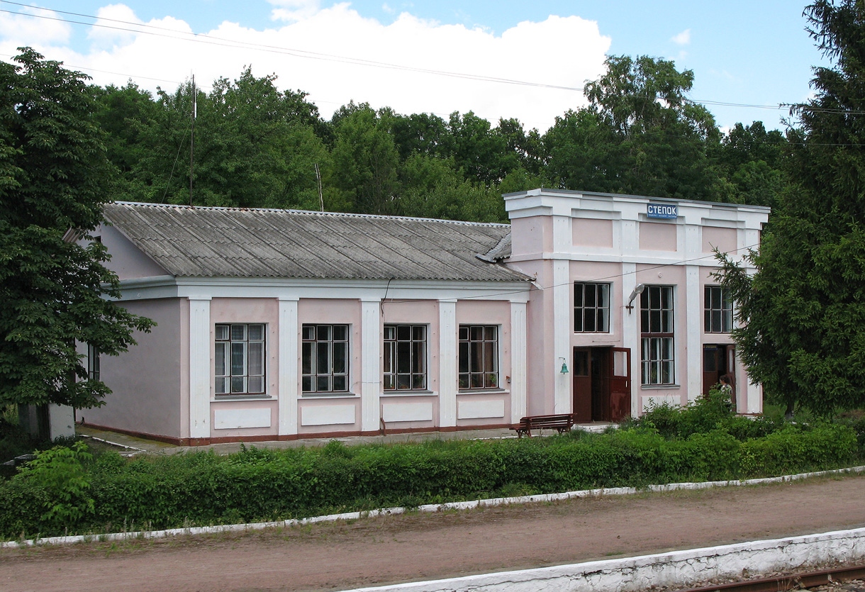 Степок